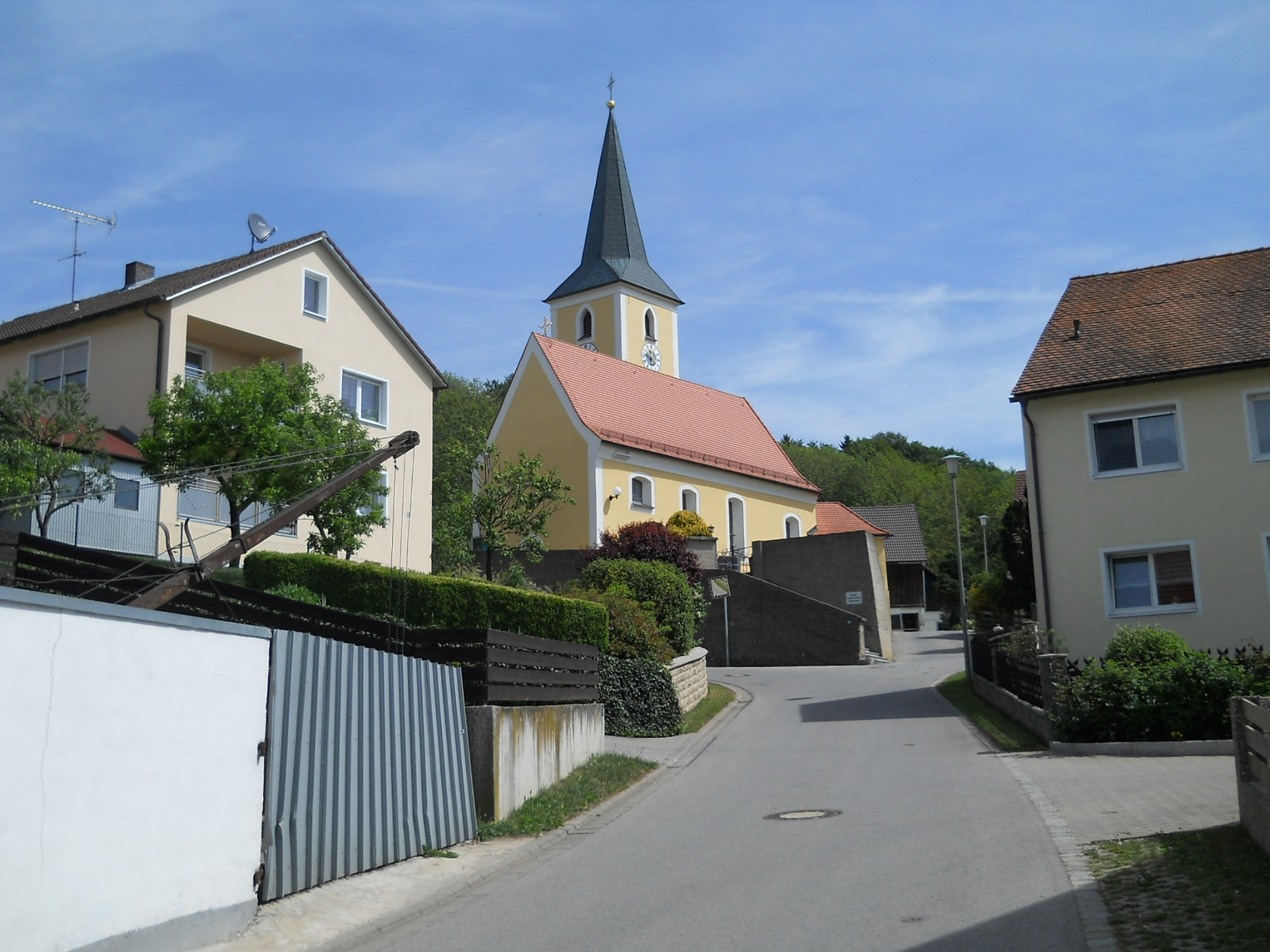 Weihersdorf, Ortsteil von Mühlhausen im Landkreis Neumarkt in der Oberpfalz, Blick zur Kirche Mariä Himmelfahrt